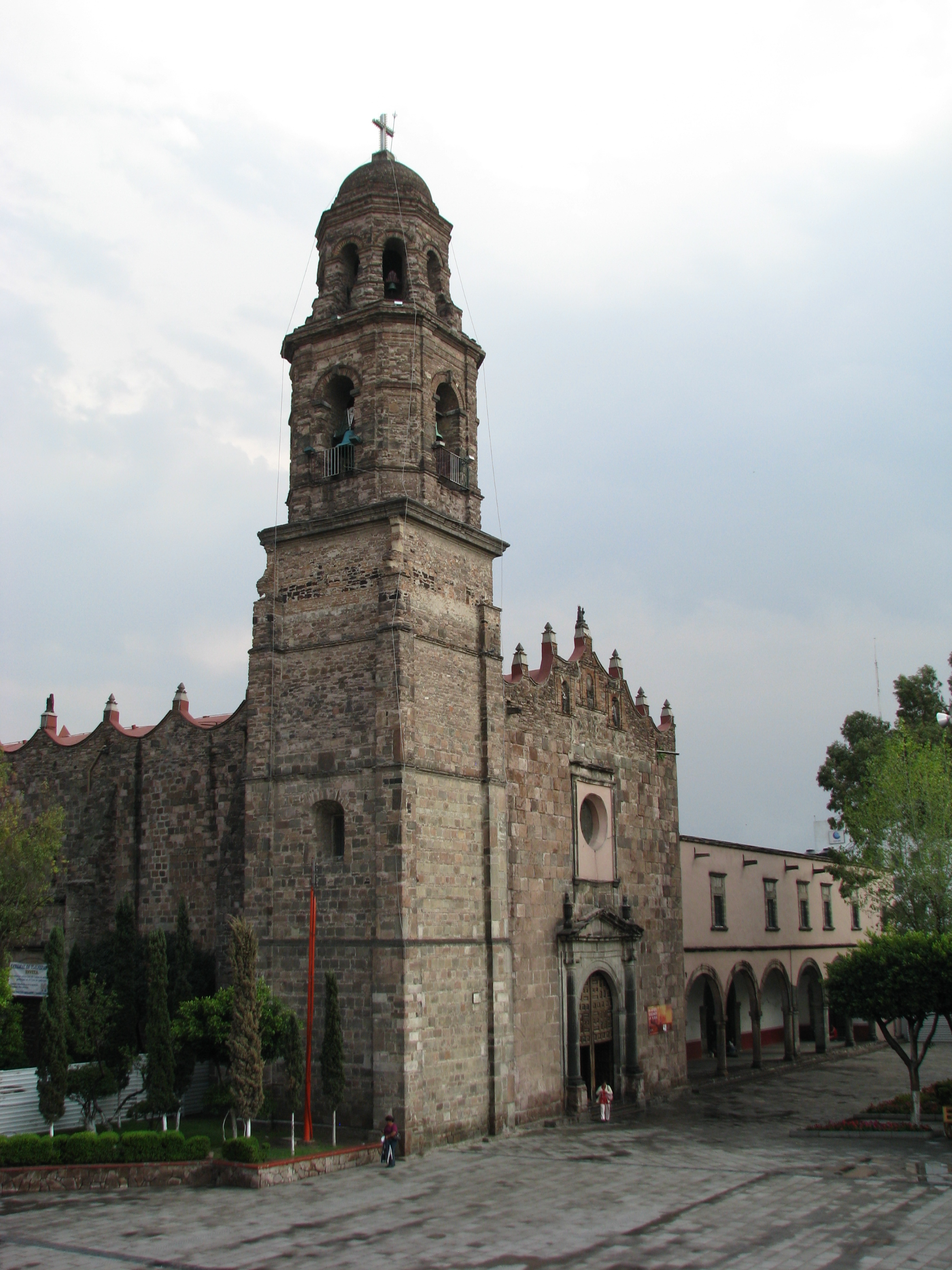 Vista del Templo Catedral Metropolitana de Tlalnepantla